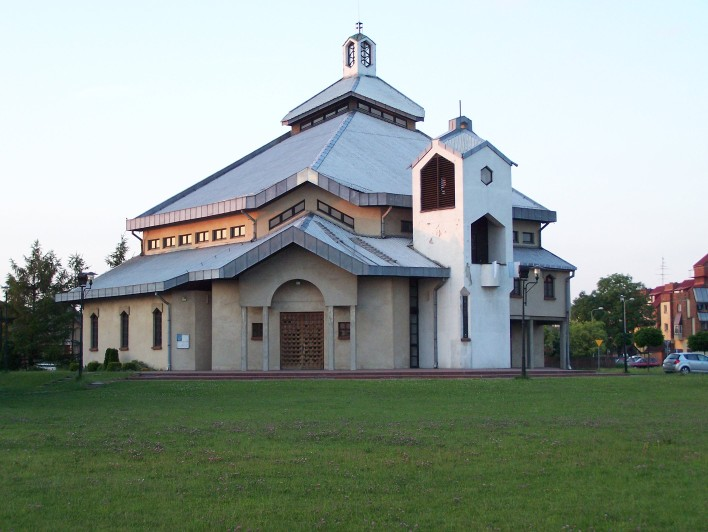 Parafia pod wezwaniem Świętej Jadwigii Śląskiej w Tychach